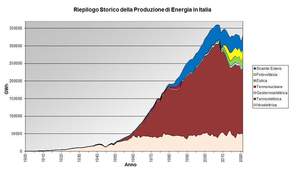 Riepilogo storico produzione energia italiana.